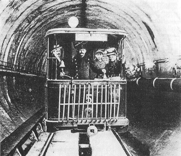 Fotomontage von Triebwagen 5 der Berliner Ostbahnen im Spreetunnel.